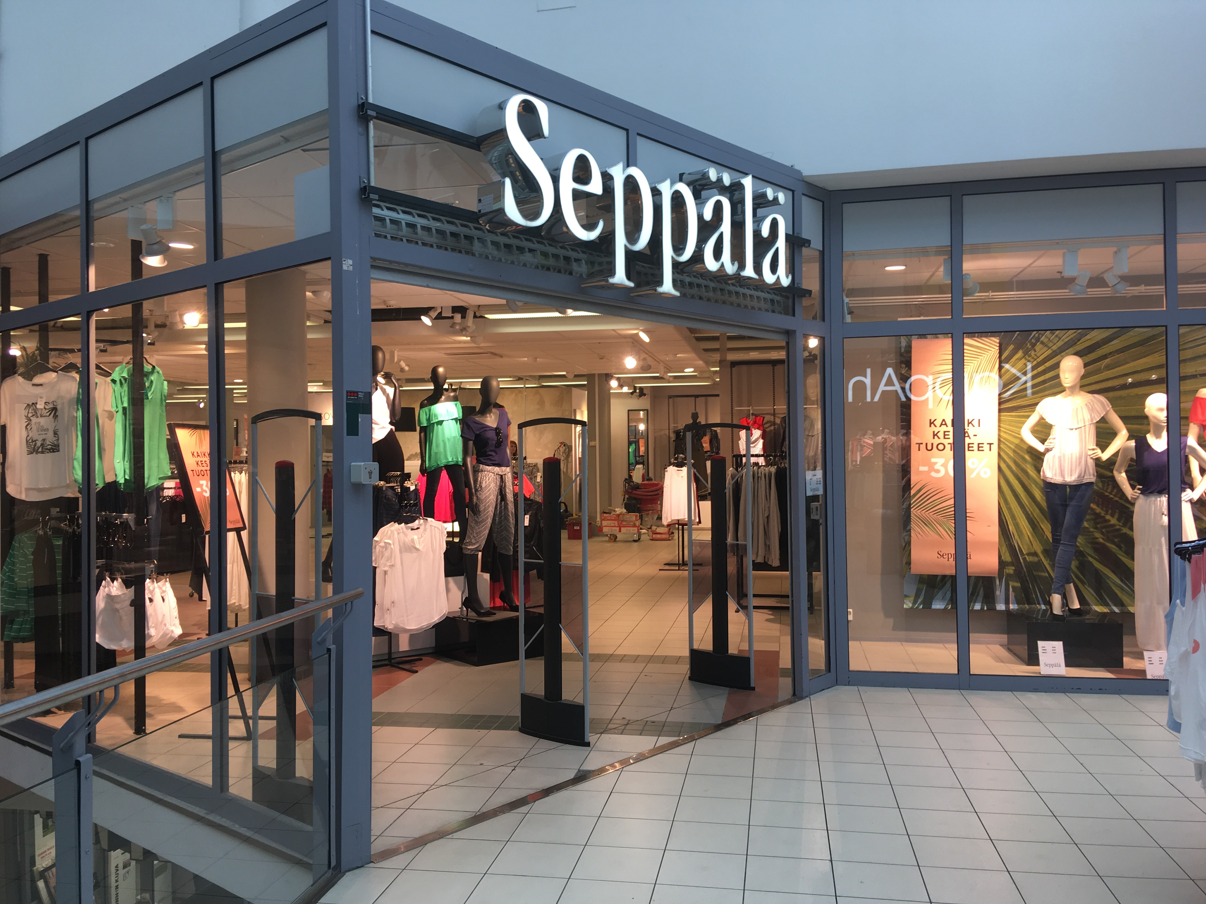 Seppälä Porvoon keskustassa, kauppakeskus Lundissa.